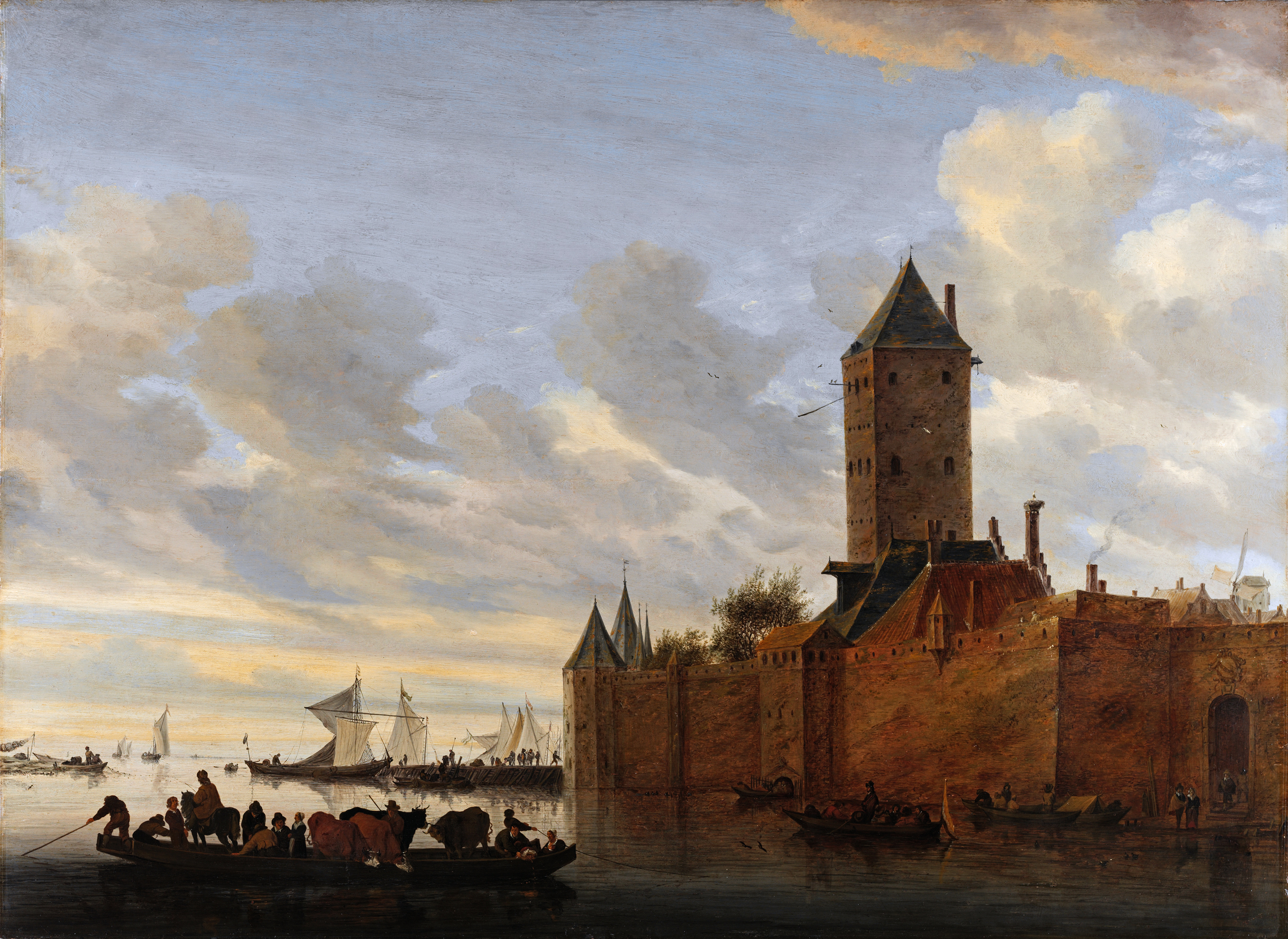 Der hohe Turm ähnelt dem Plometoren in Utrecht. Die Stadt mit dem Fluss erinnert an Nimwegen.